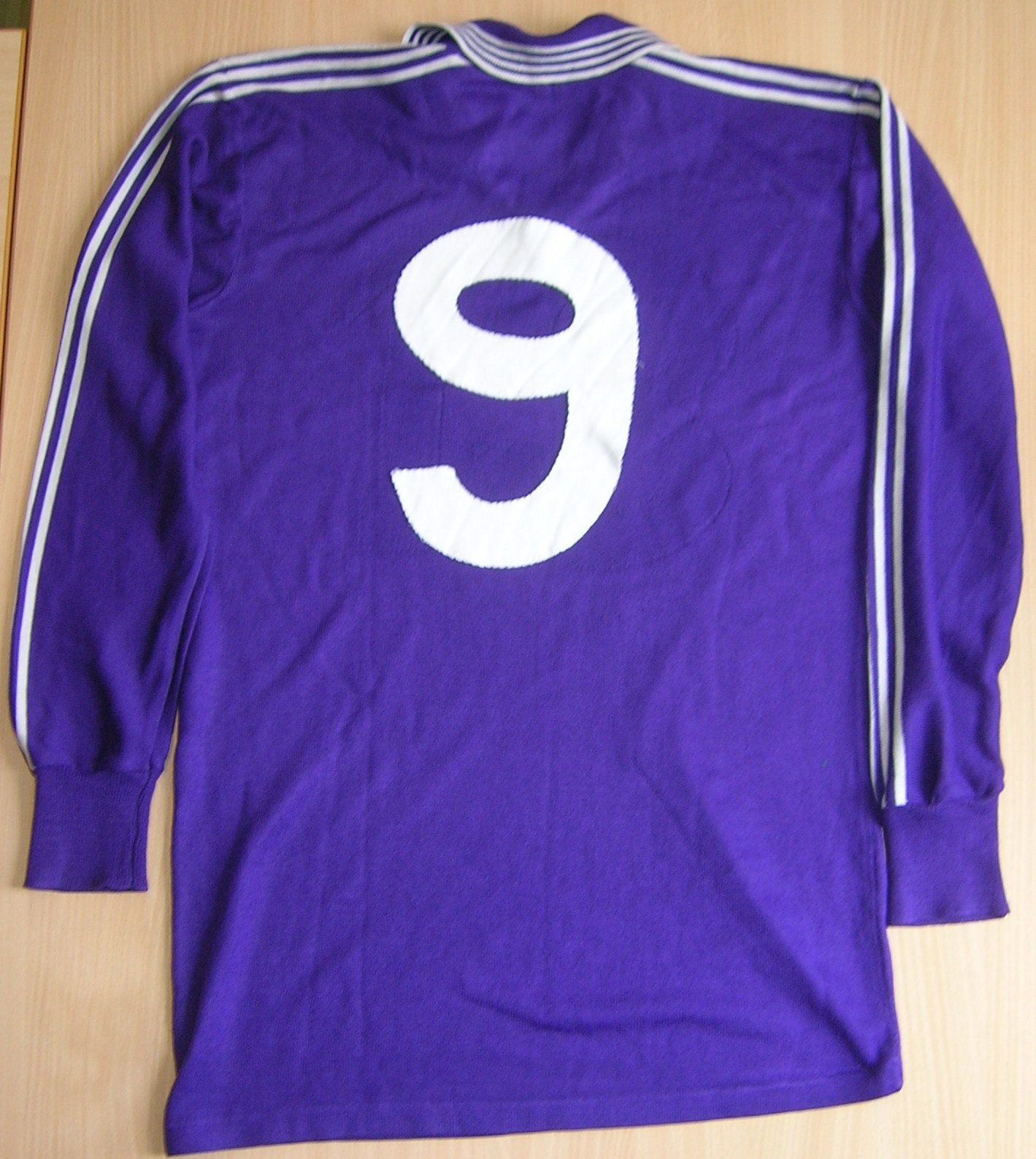 Maglia del Casoria originale in lanetta della NR anni 80 da collezione privata.